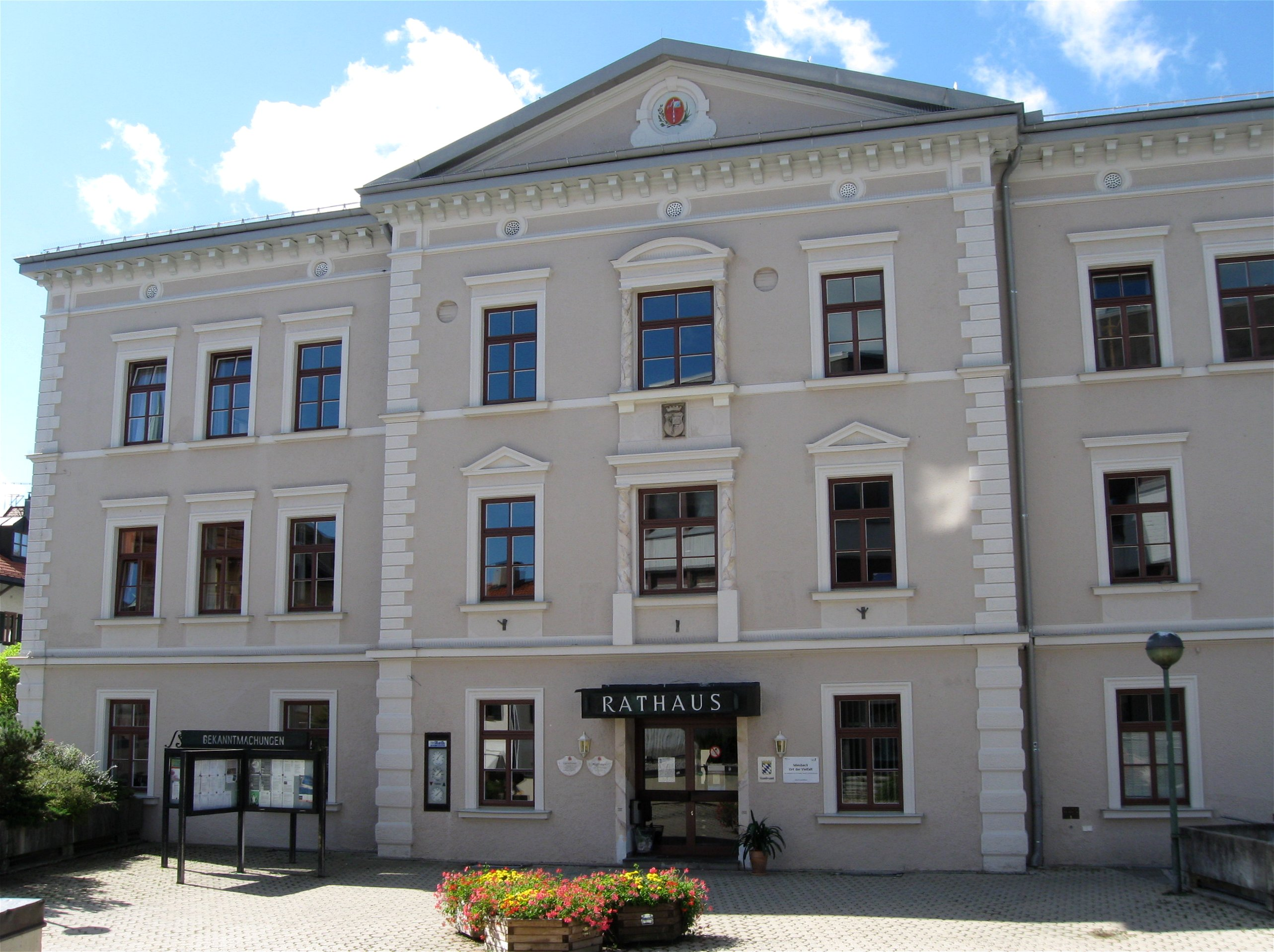 Rathausplatz 1; Rathaus, Neurenaissance, mit Giebelrisalit an der nördlichen Eingangsseite, 1878/1879 durch Baumeister Johann Bernlochner errichtet.